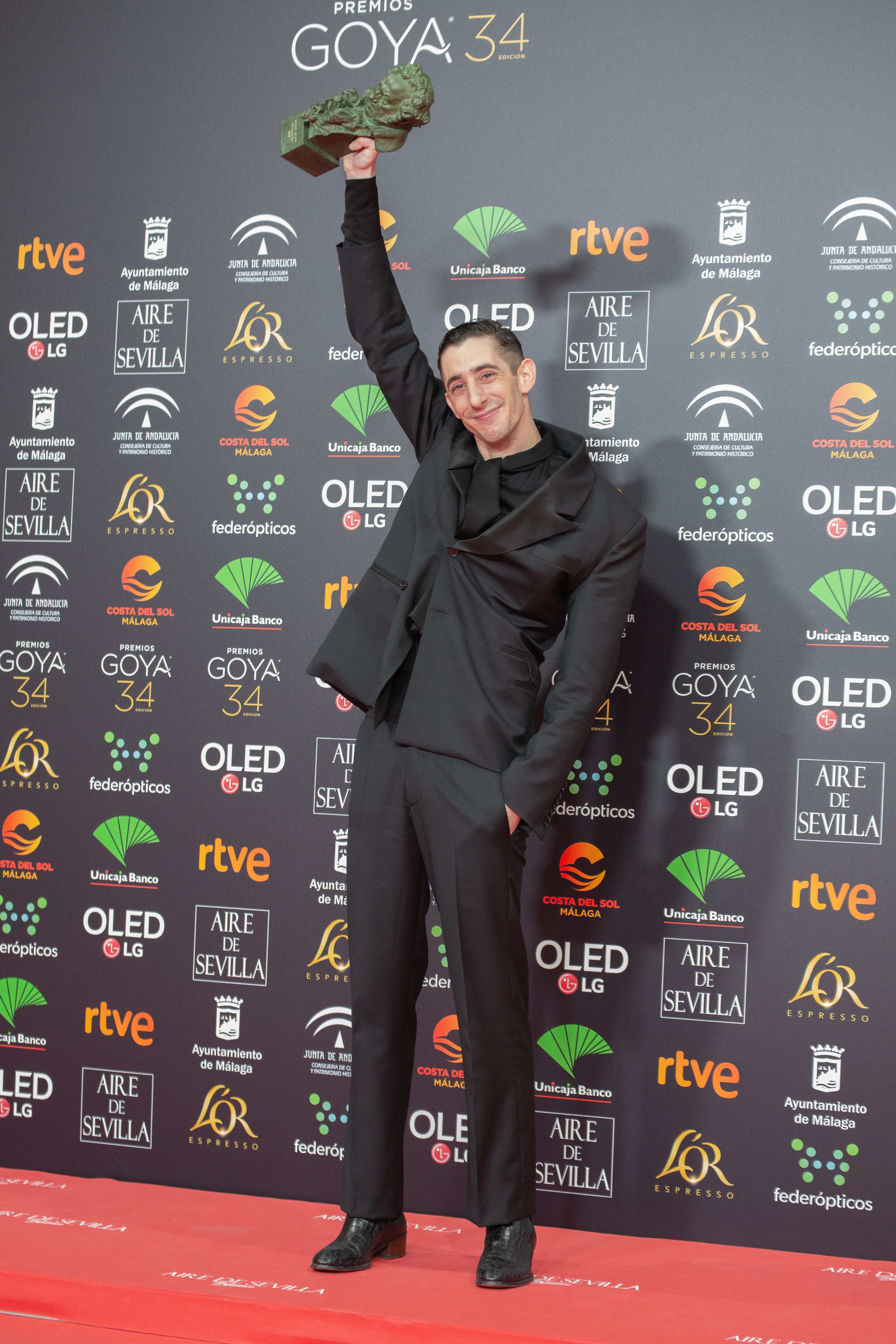 Enric Auquier con su Goya a Mejor actor revelacion en la Gala de los Goya 2020